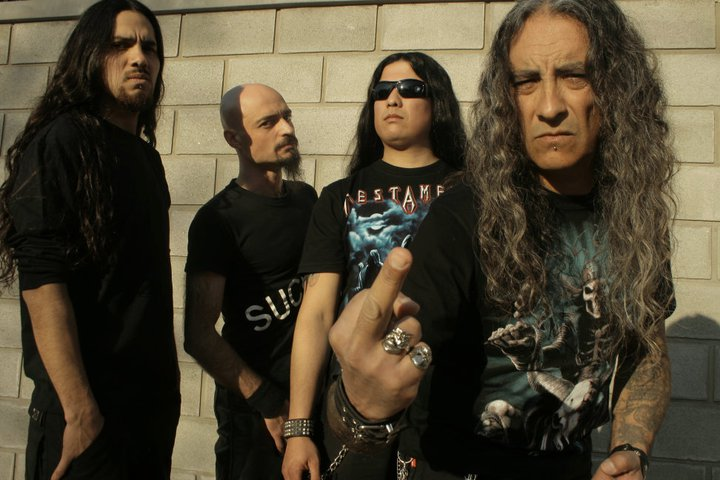 Lethal